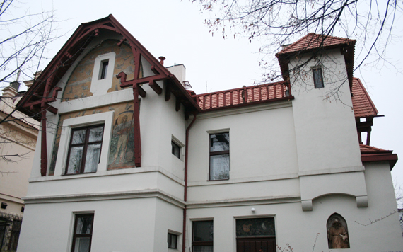 Česky: Koulova vila ve Slavíčkově ul. č. 17 (č. p. 153) v Praze-Bubenči, Česká republika